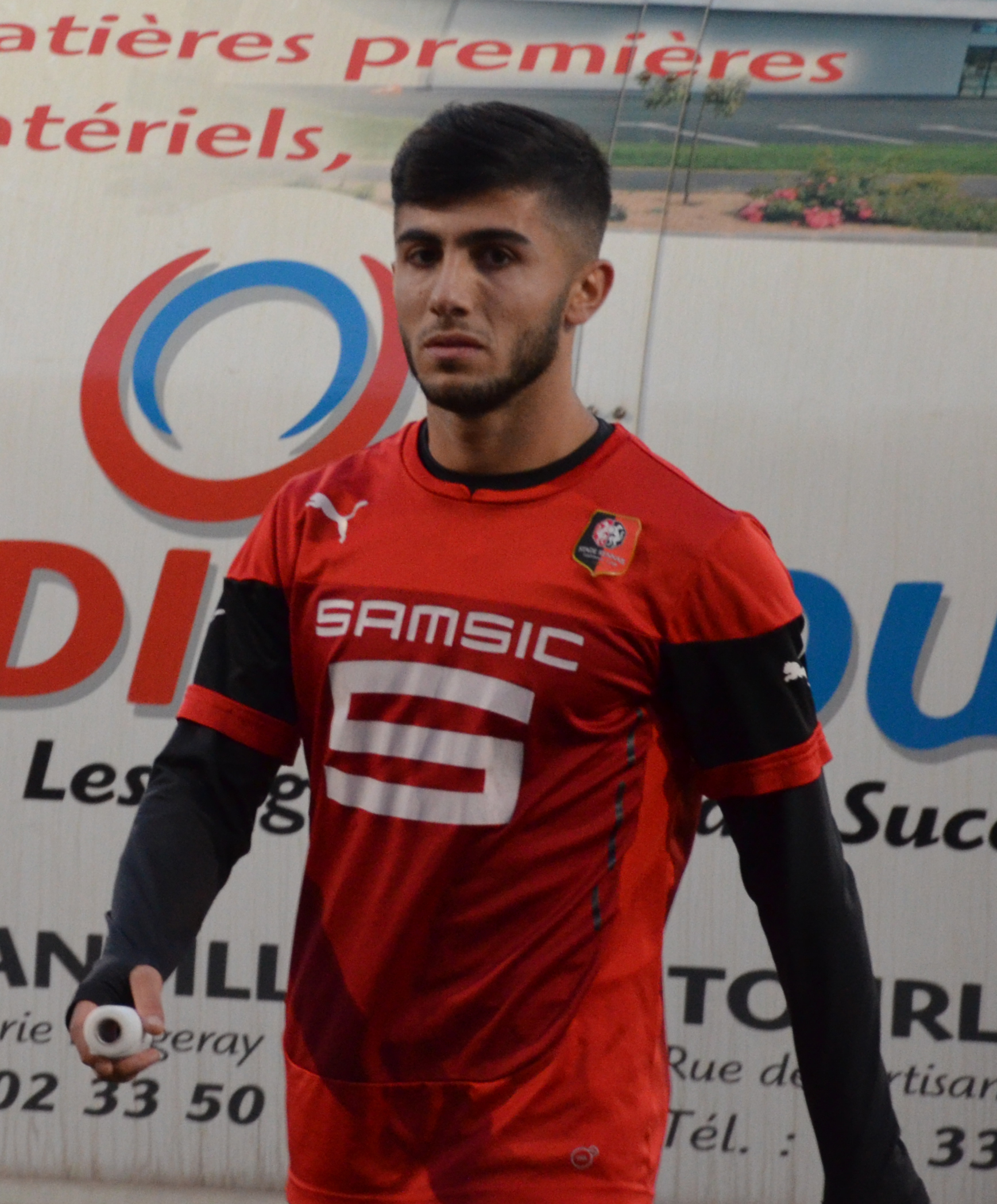 Photographie prise avant la rencontre de CFA2 opposant l'US Granville à la réserve du Stade rennais. Ici, Zana Allée.